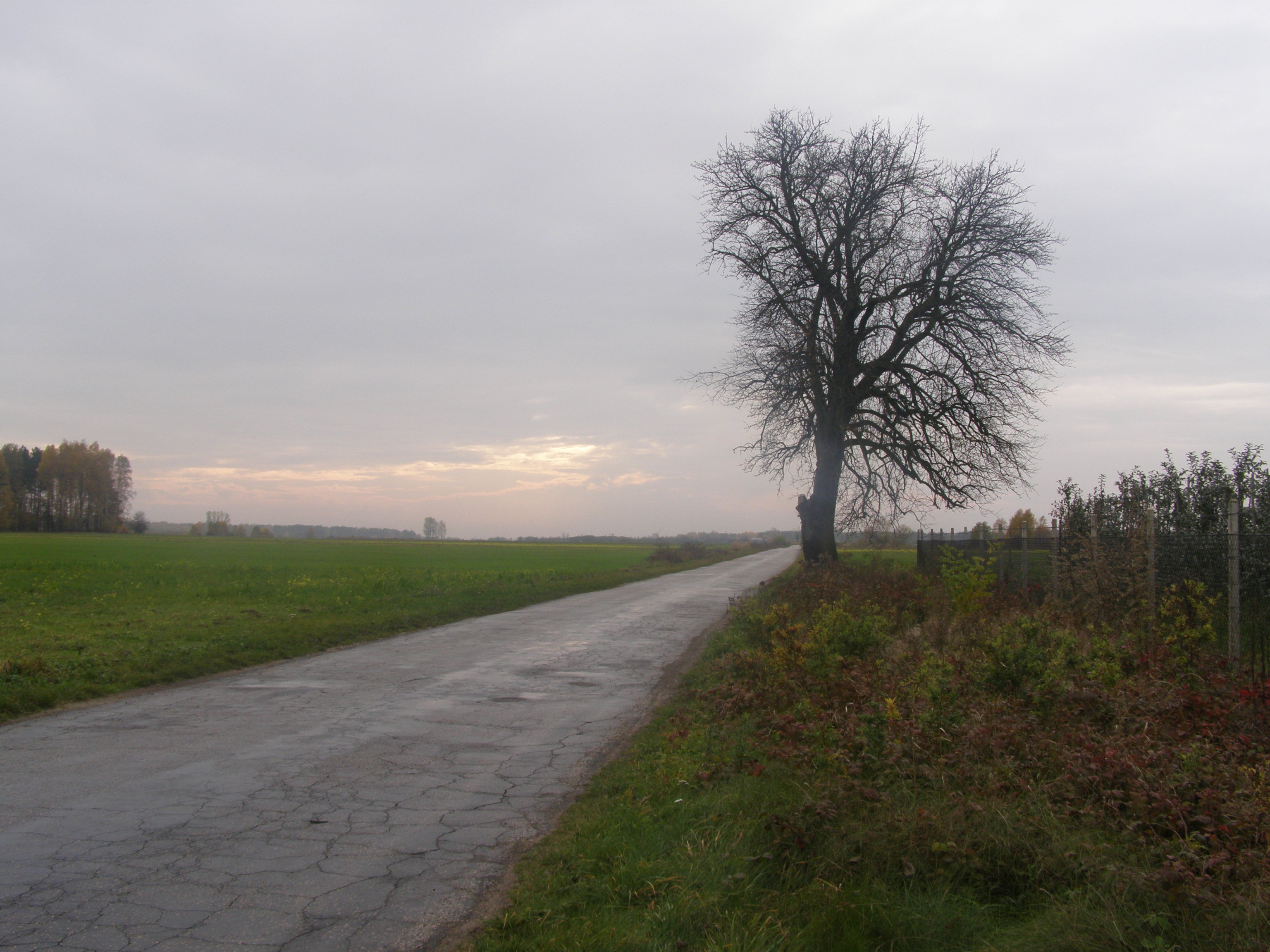 Droga przebiegająca przez Kraśnicę, prowadząca do miejscowości Modrzew. Autor Andrzej Stępień